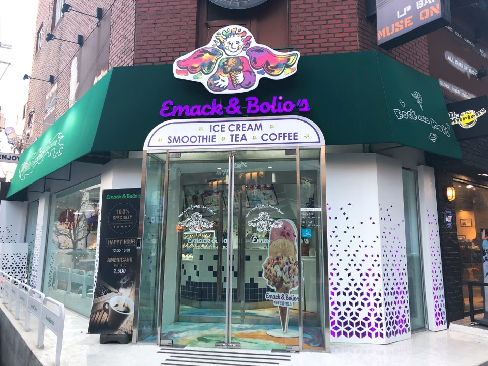 가로수길에 있는 에맥앤볼리오스 매장